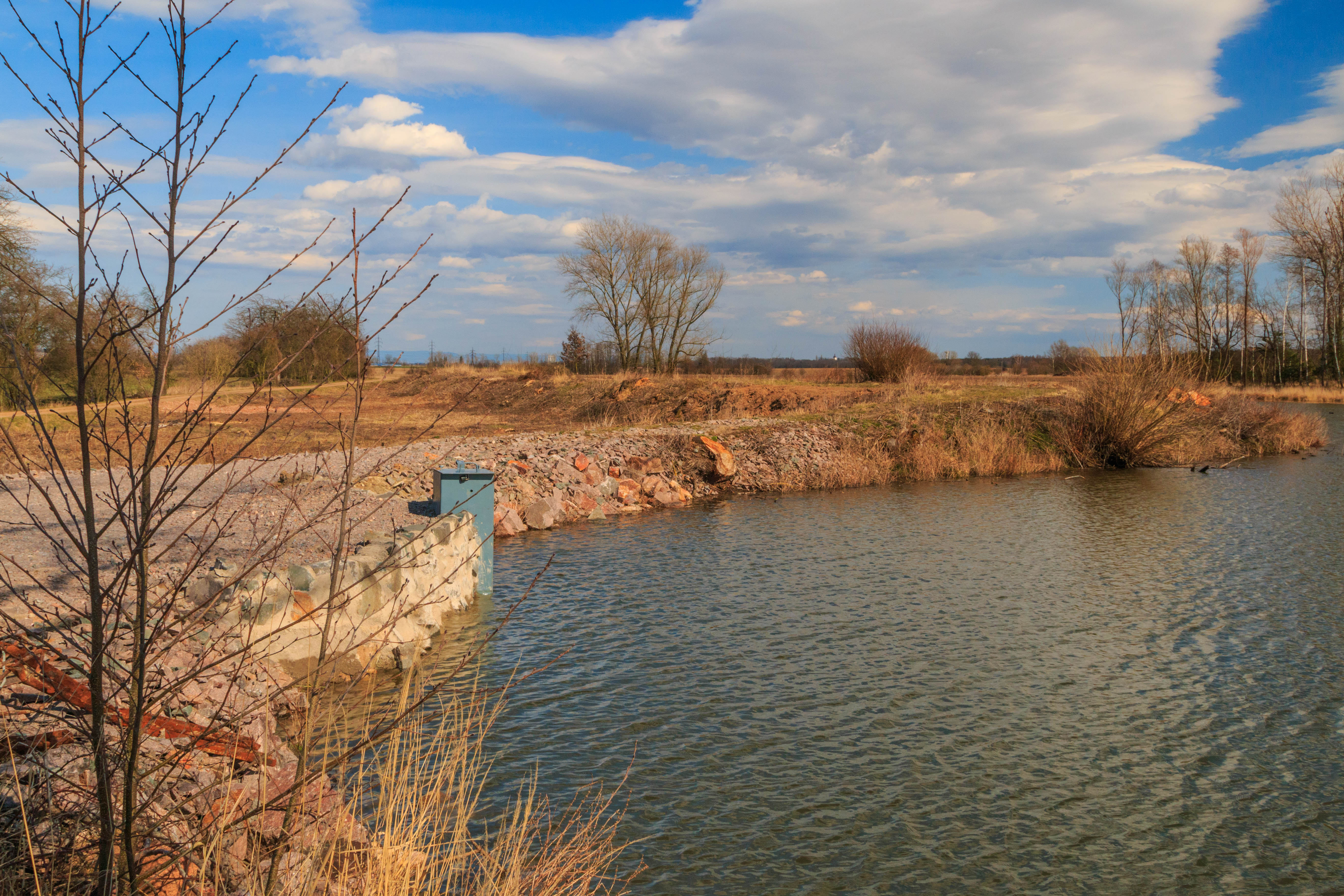 Rybník Zmotálek u Obědovic Project: Vodstvo.